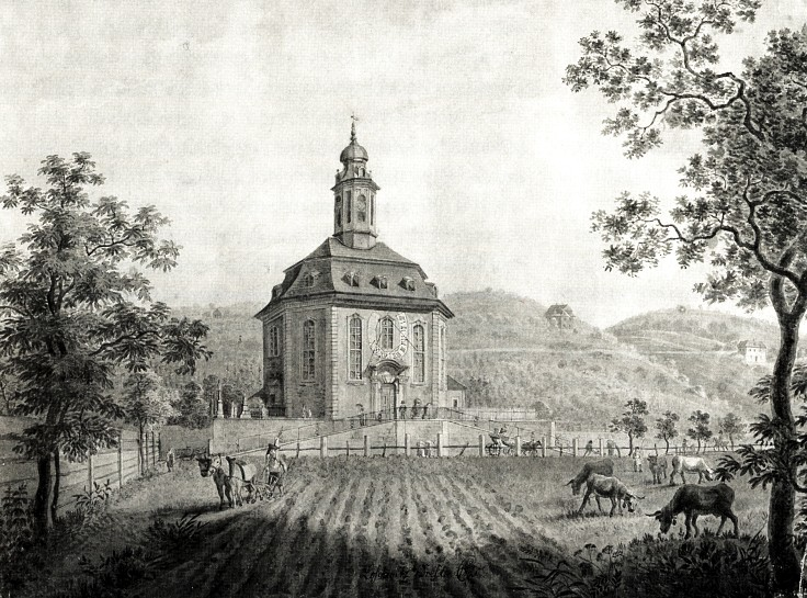 Die Kirche zu Loschwitz, um 1820, Sepia